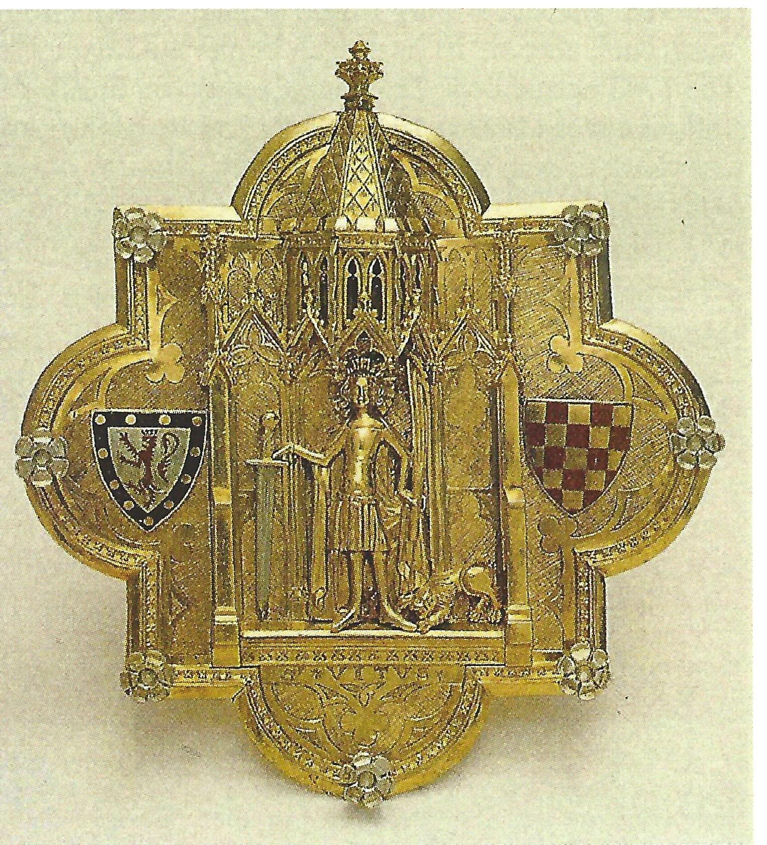 Pectorale of enkolpion van Ermgard van den Bergh, 13e abdis van het stift Elten (ca. 1335) Gebruikt als gesp voor de koormantel. Links het wapen van de vader (Van den Bergh), rechts het wapen van de moeder (Randerode). In het midden een afbeelding van St. Vitus met leeuw